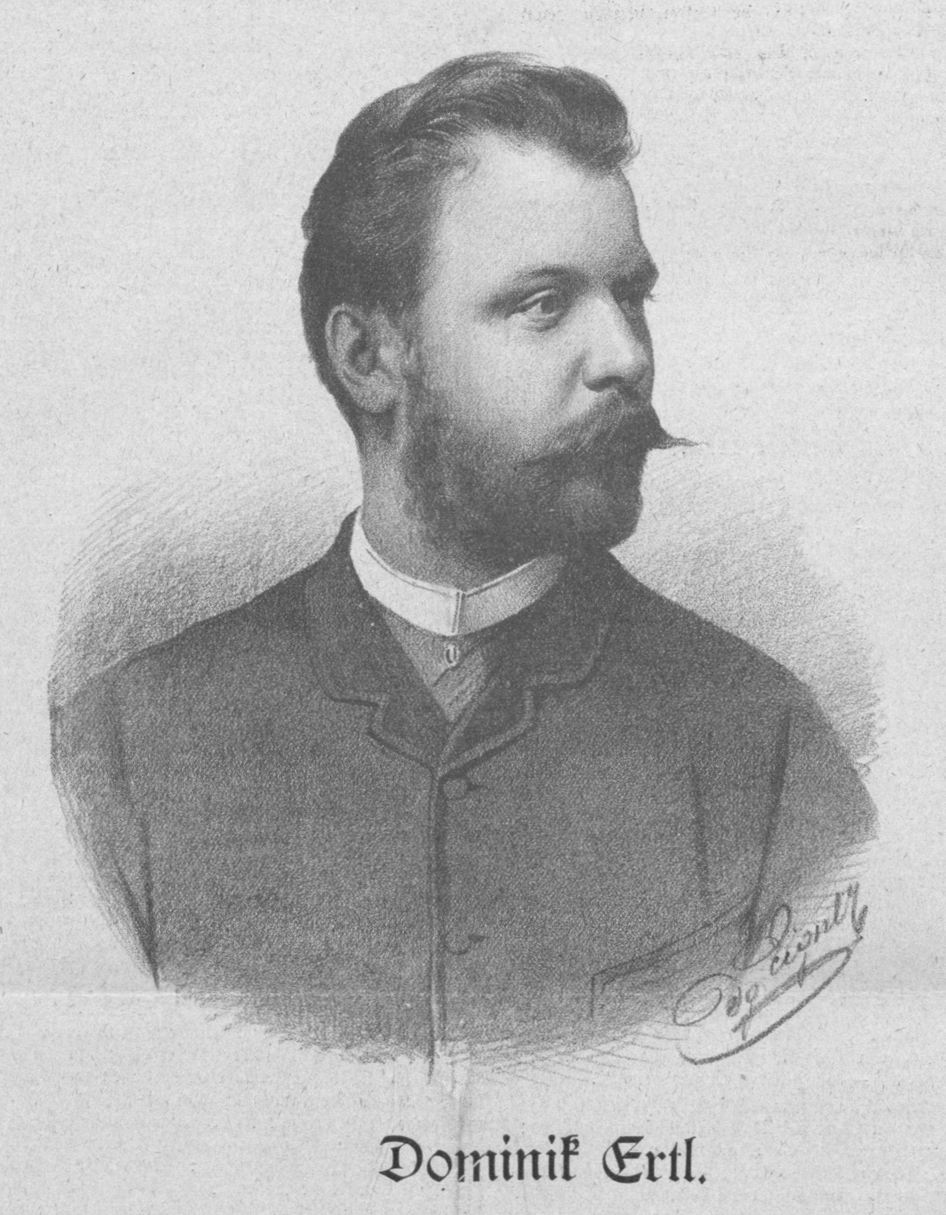 Porträt von Dominik Ertl (1857–1911), österreichischer Kapellmeister und Komponist.